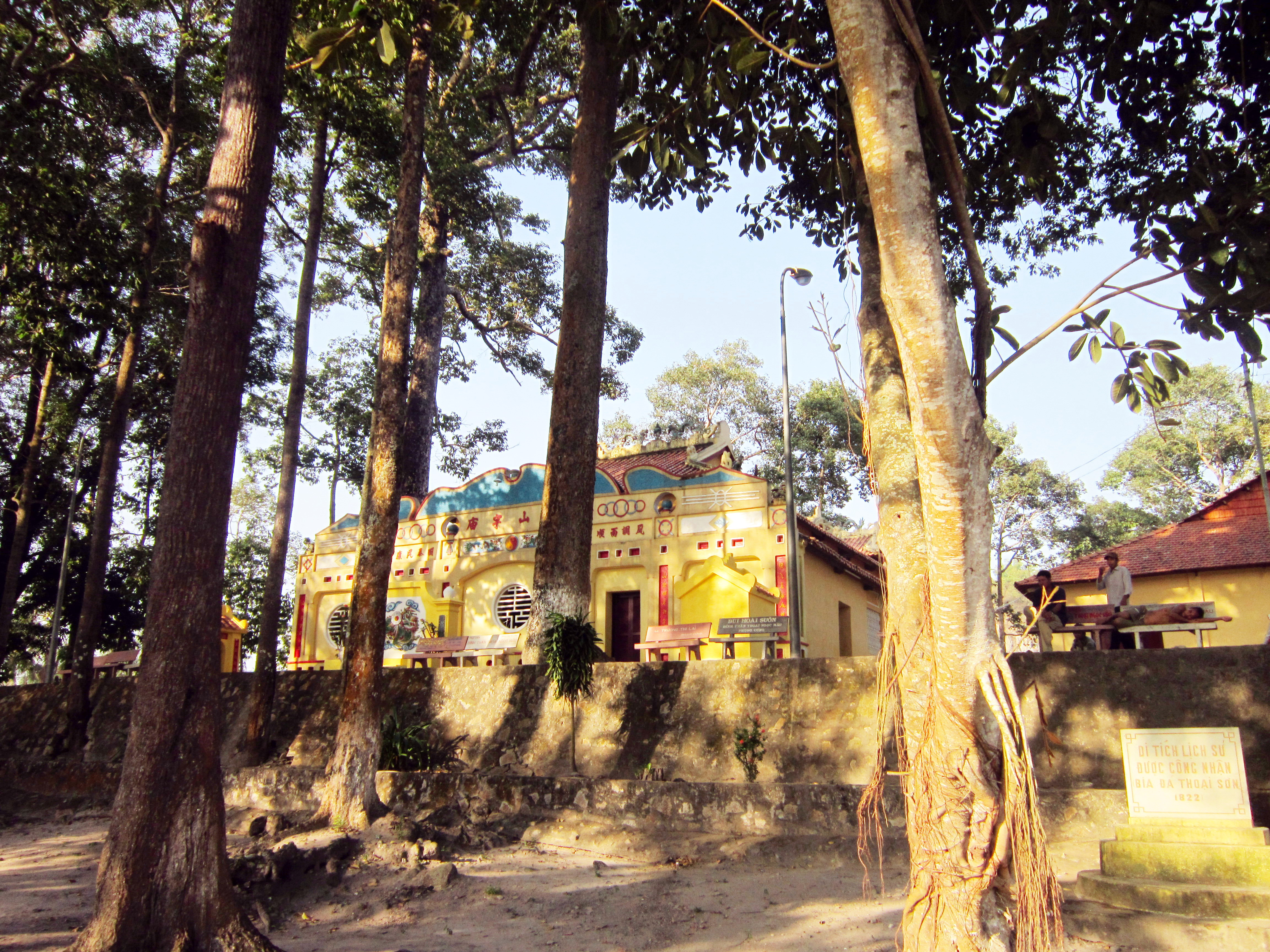 Đền thần Thoại Ngọc Hầu bên triền núi Sập, nay thuộc huyện Thoại Sơn, tỉnh An Giang, Việt Nam.